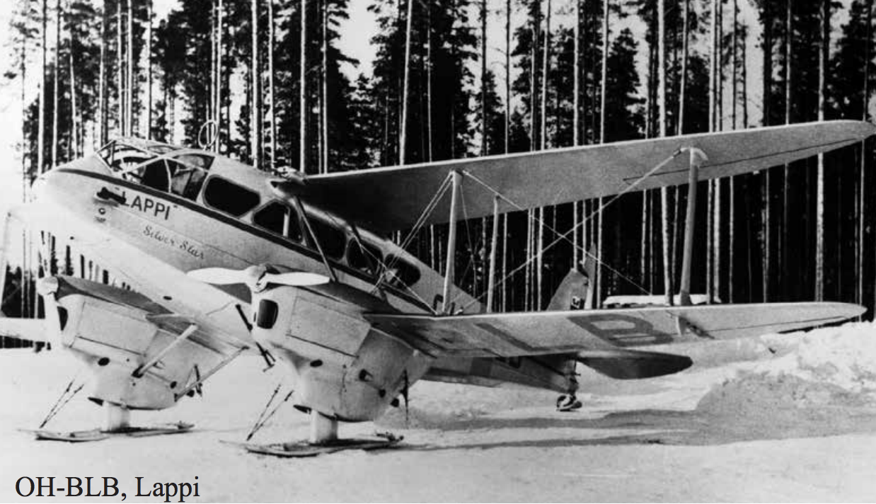 Aero O/Y:n lentokone de Havilland Dragon Rapide “Lappi”.